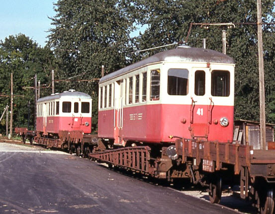 Auf SBB-Rollschemel aufgeladene Anhängerwagen B41 und B42 der Biel-Täuffelen-Ins-Bahn auf dem Weg zur Chemin de fer Nyon–Saint-Cergue–Morez. Die Wagen wurden 1947 für die Bremgarten-Dietikon-Bahn gebaut.